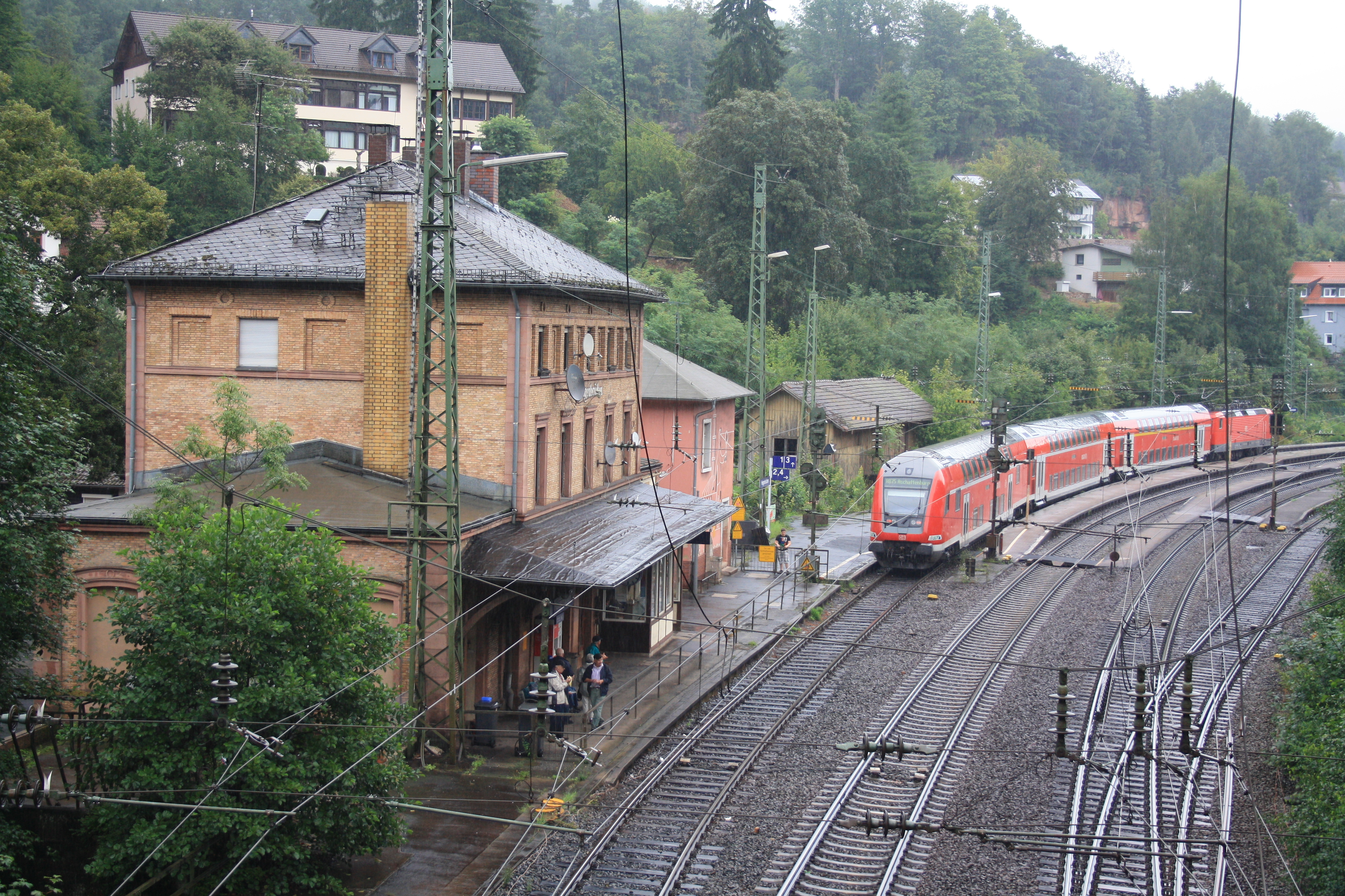 Bahnhof Heigenbrücken an der Main-Spessart-Bahn kurz nach dem Schwarzkopftunnel. Aufnahmeort des Bildes war die Brücke der Staatstraße 2317 über die Bahnstrecke.